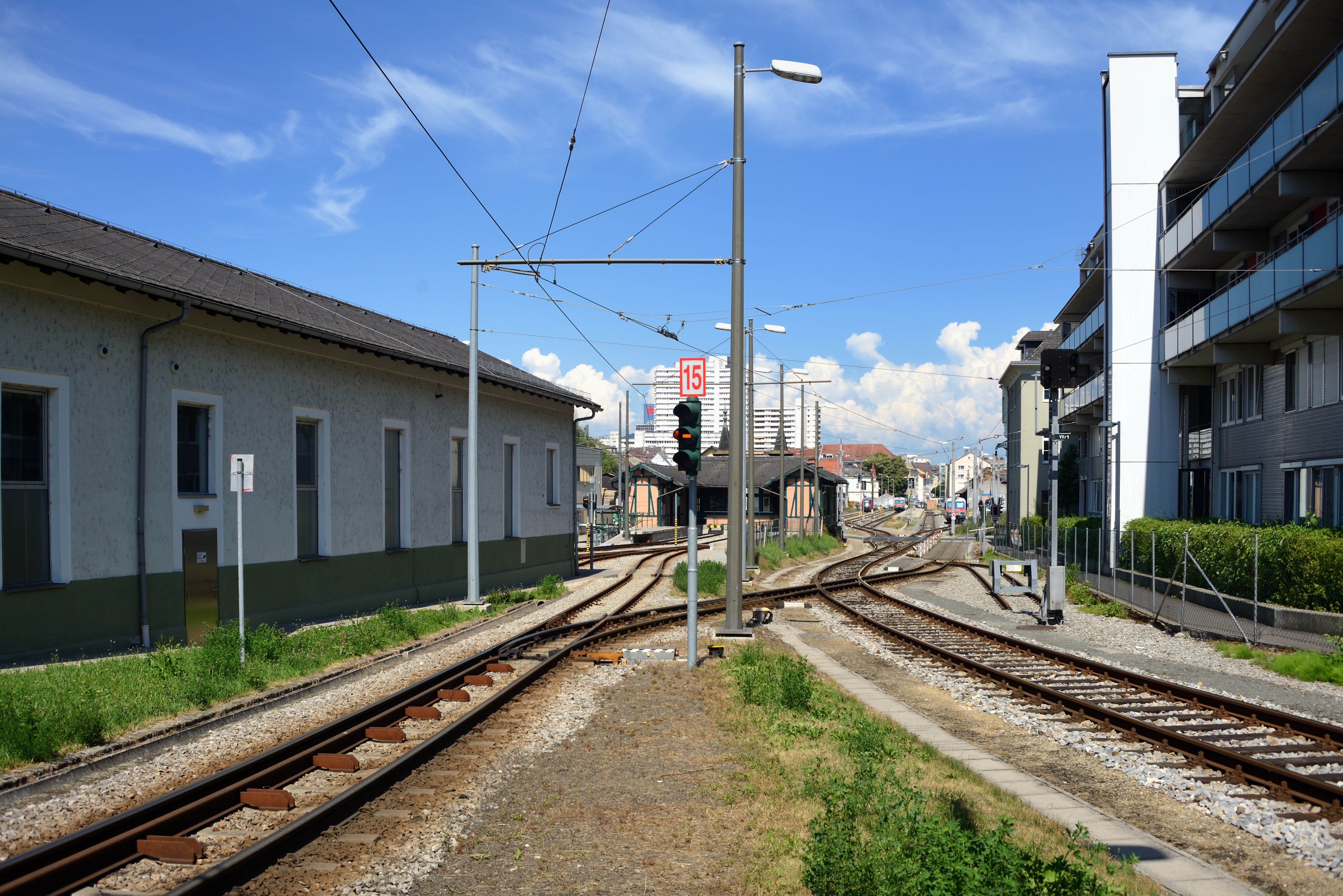 Gleiskreuzung Mühlkreisbahn Pöstlingbergbahn beim Bahnhof Linz Urfahr